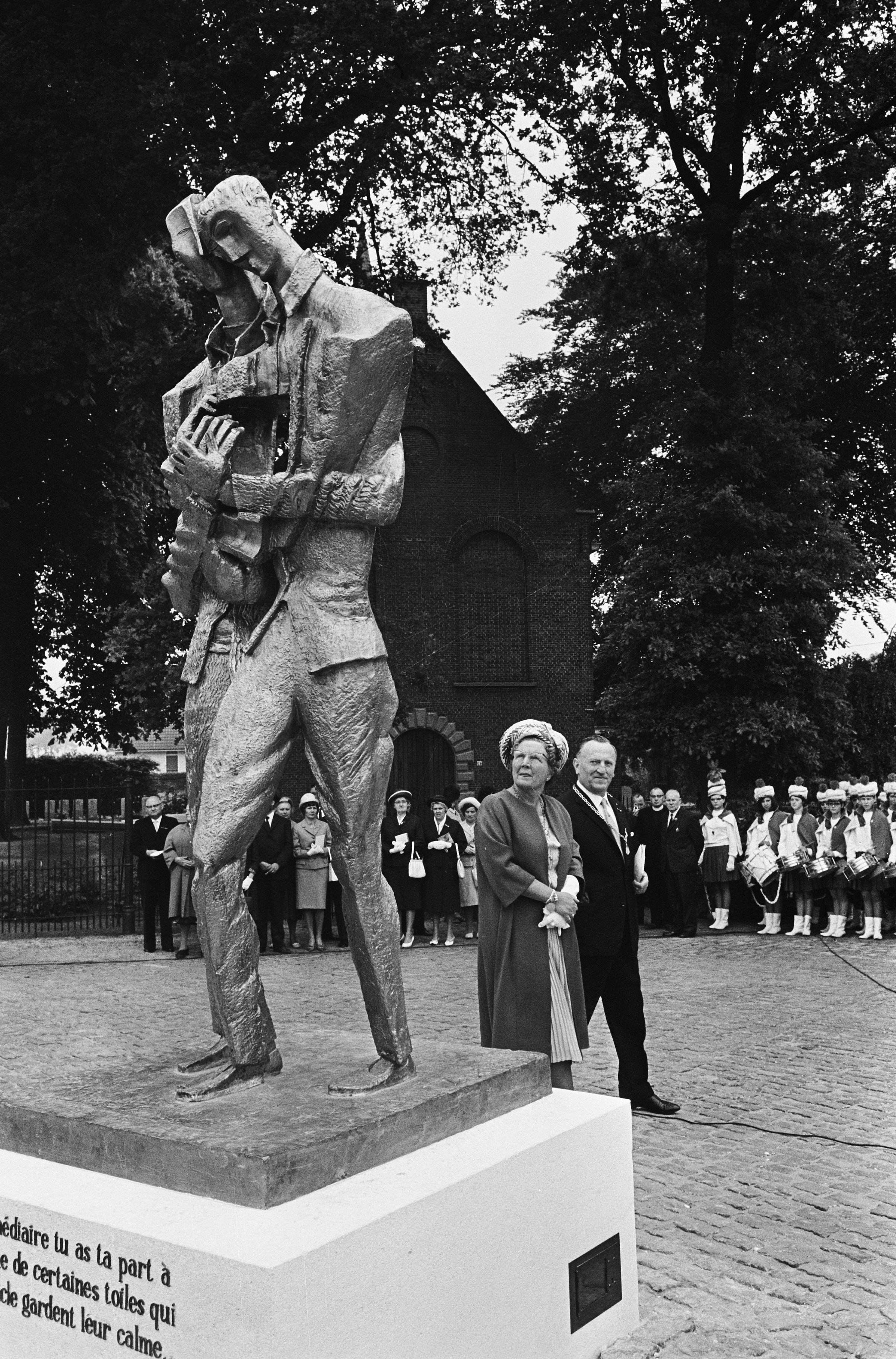 Collectie / Archief : Fotocollectie Anefo Reportage / Serie : Koningin Juliana onthult het Van Gogh-monument in Zundert Beschrijving : De koningin en burgemeester G.J.A. Manders bij monument Datum : 28 mei 1964 Locatie : Noord-Brabant, Zundert Trefwoorden : beeldhouwwerken, burgemeesters, koninginnen Persoonsnaam : Juliana (koningin Nederland), Manders, G.J.A. Instellingsnaam : Van Gogh-monument Fotograaf : Fotograaf Onbekend / Anefo, [onbekend] Auteursrechthebbende : Nationaal Archief Materiaalsoort : Negatief (zwart/wit) Nummer archiefinventaris : bekijk toegang 2.24.01.05 Bestanddeelnummer : 916-4845